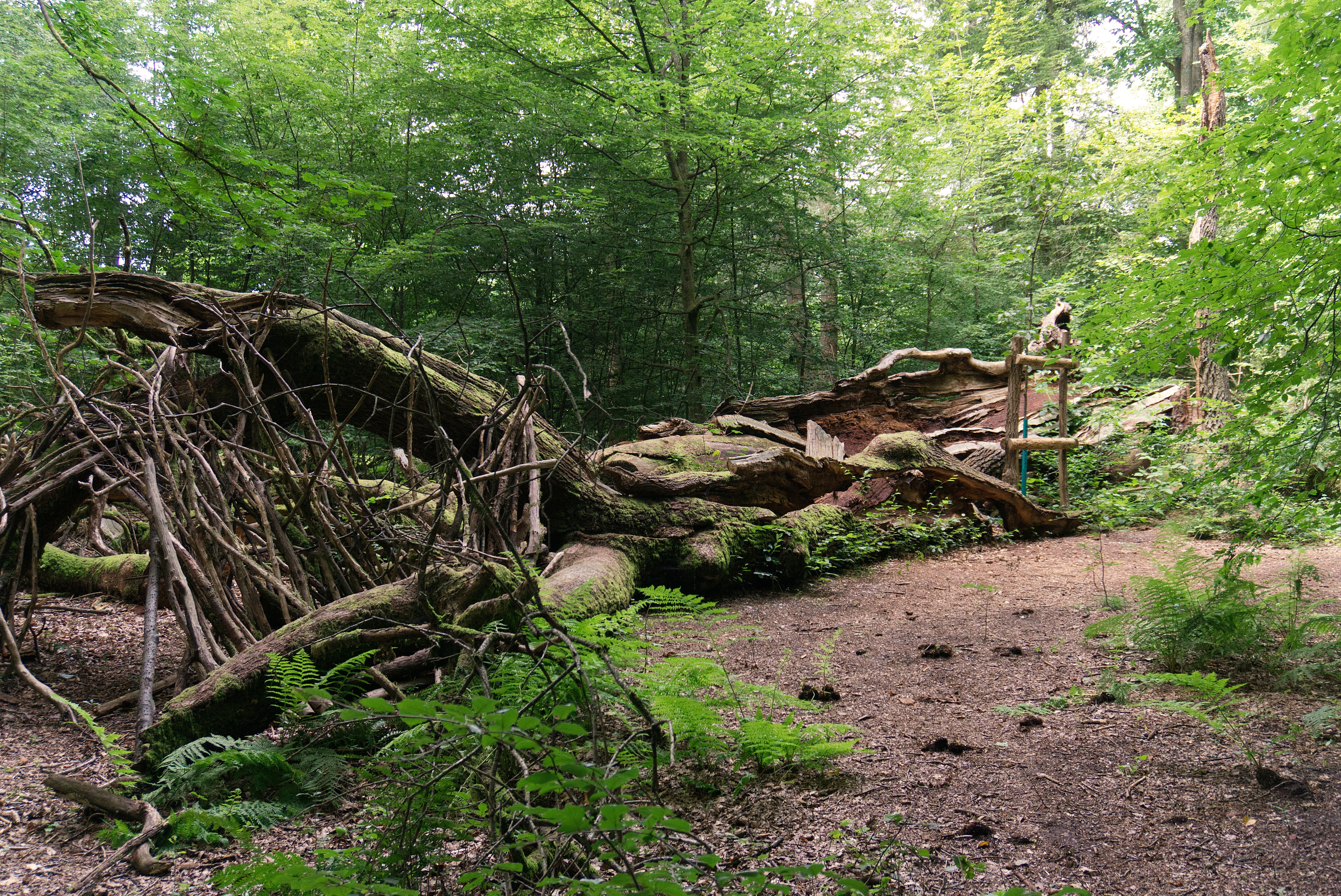 Die auch als 1000-jährige Eiche bezeichnete Boxhohn-Eiche war lange Zeit der älteste Baum in der Wahner Heide. Sie brach 2019 zusammen.